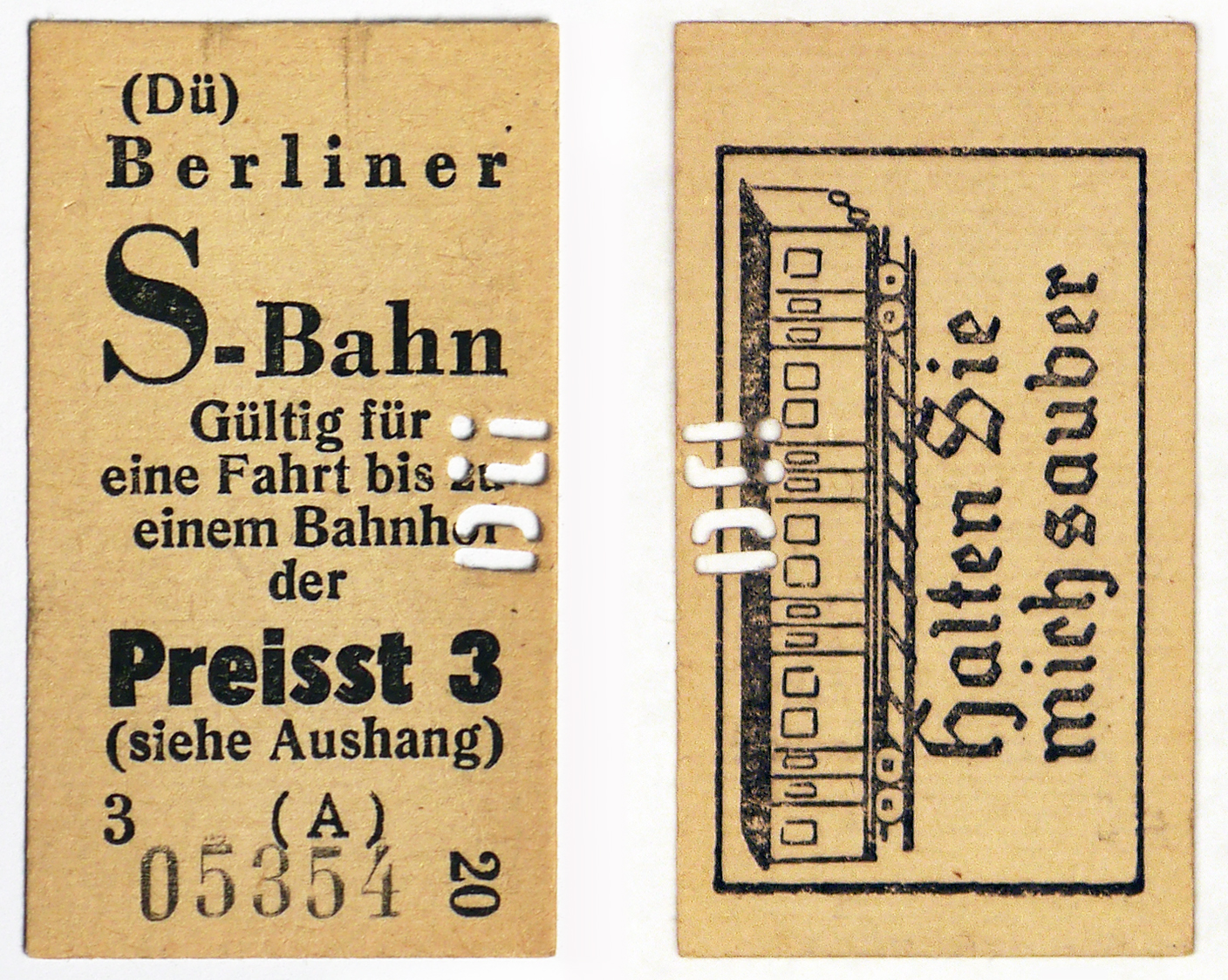 S-Bahn-Fahrkarte, gekauft und entwertet am Haltepunkt Düppel-Kleinmachnow, 1961. Die Rückseite zeigt einen stilisierten S-Bahn-Wagen und den Text "Halten Sie mich sauber". Der Haltepunkt war seinerzeit die einzige Möglichkeit für Kleinmachnower, um (über Westberlin) nach Ostberlin zu gelangen, wo viele von ihnen arbeiteten.